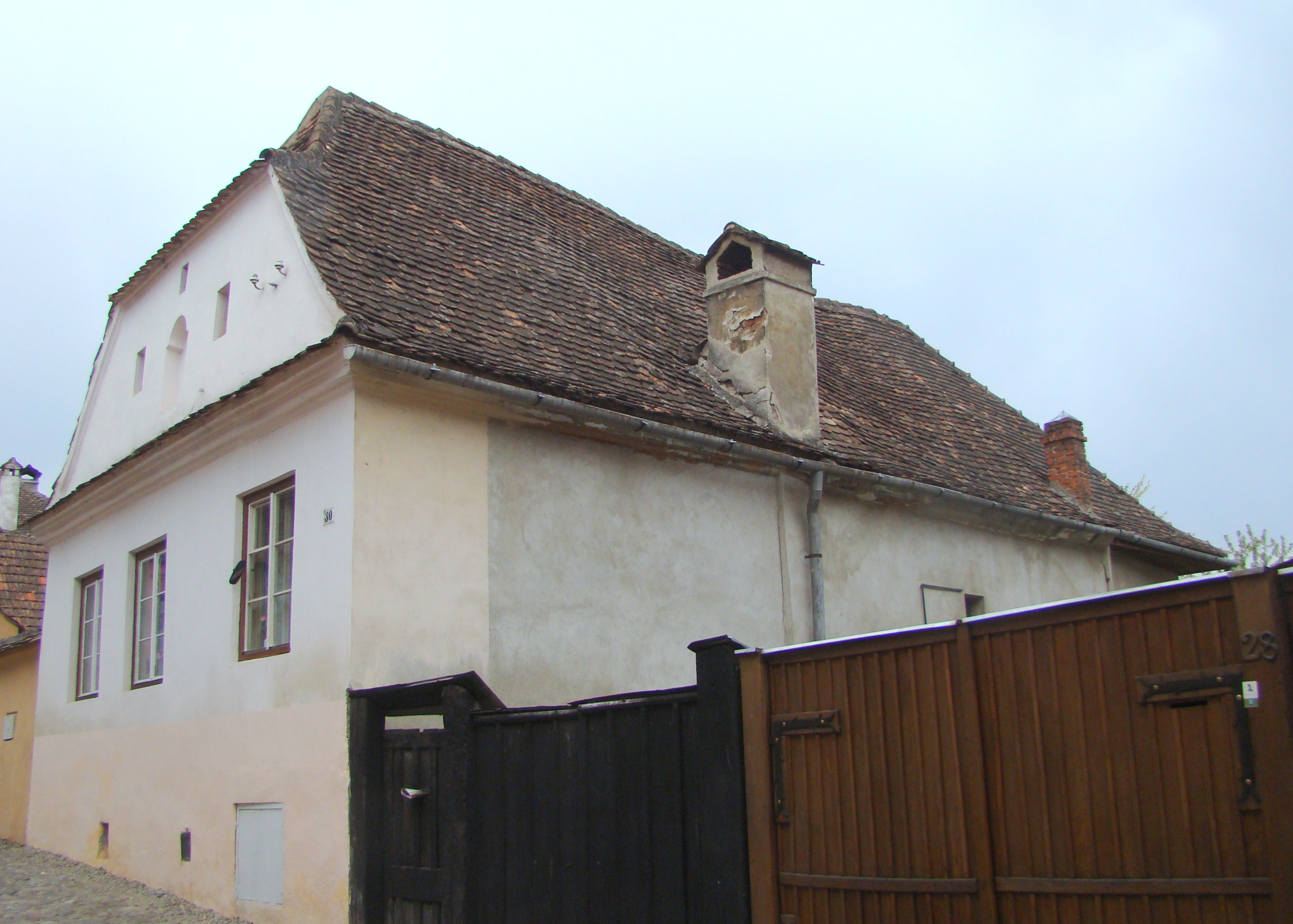 Casa Ernest, municipiul Sighișoara, str. Tâmplarilor 30 1716, 1800 - 1850